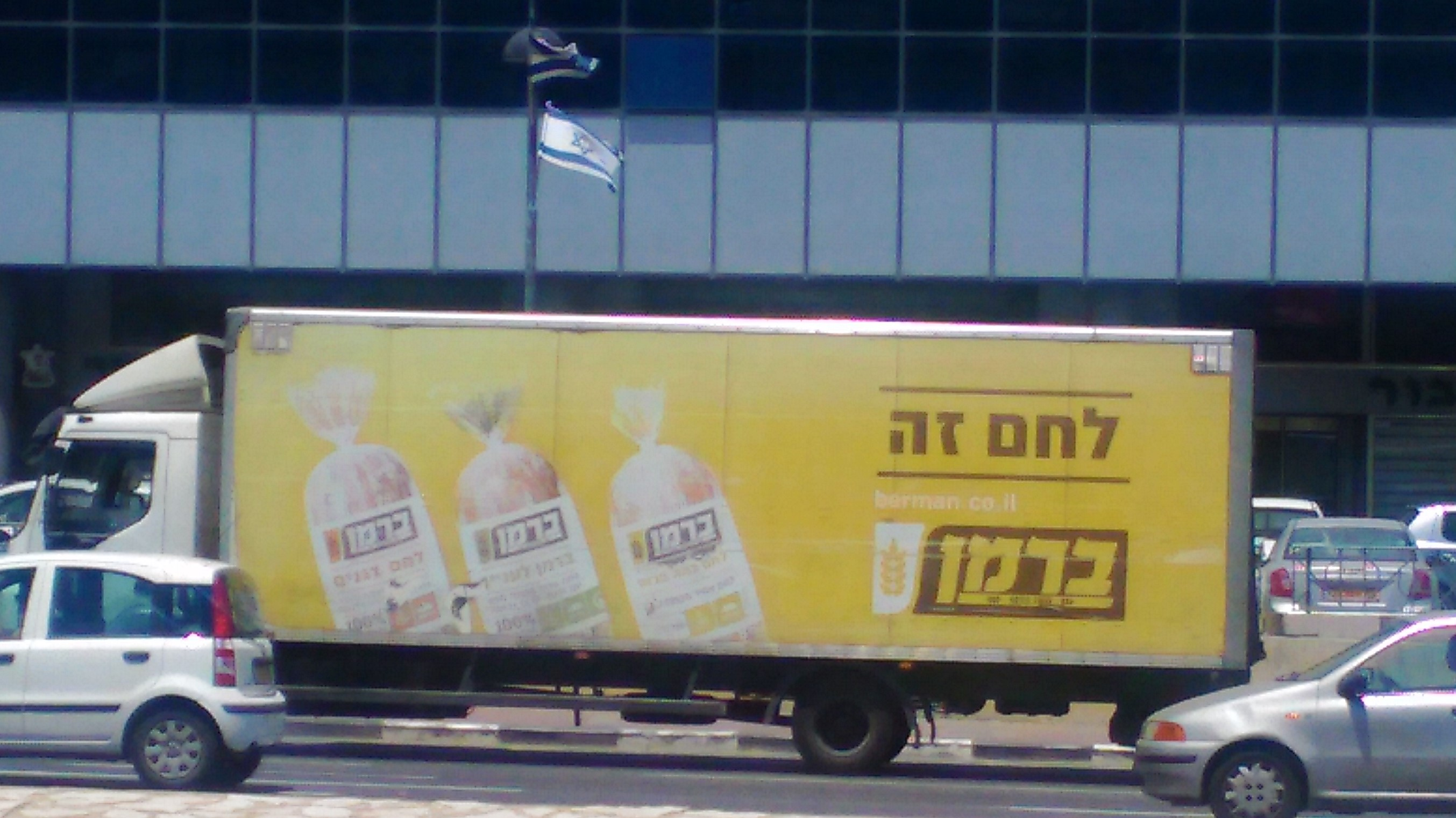 משאית של מאפיית ברמן